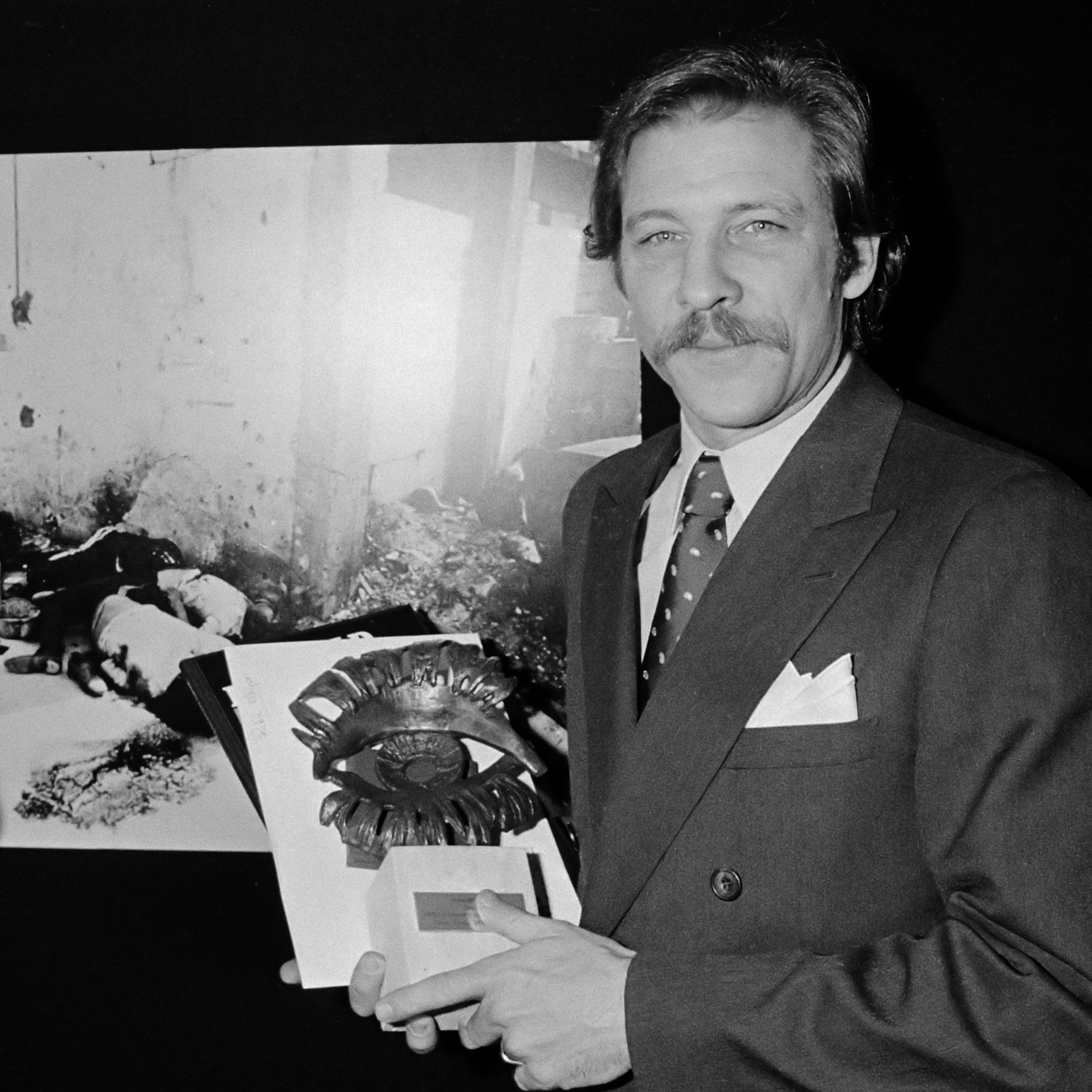 Premier Lubbers (l) reikt het Gouden Oog uit aan Robin Moyer voor World Press Photo 1983 30 maart 1983